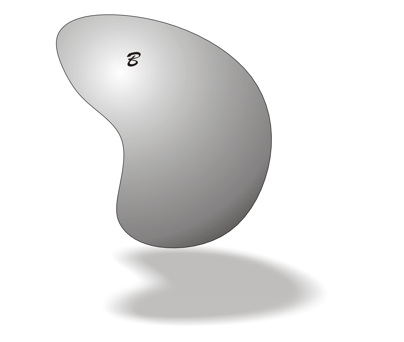 Cauchy continuum body